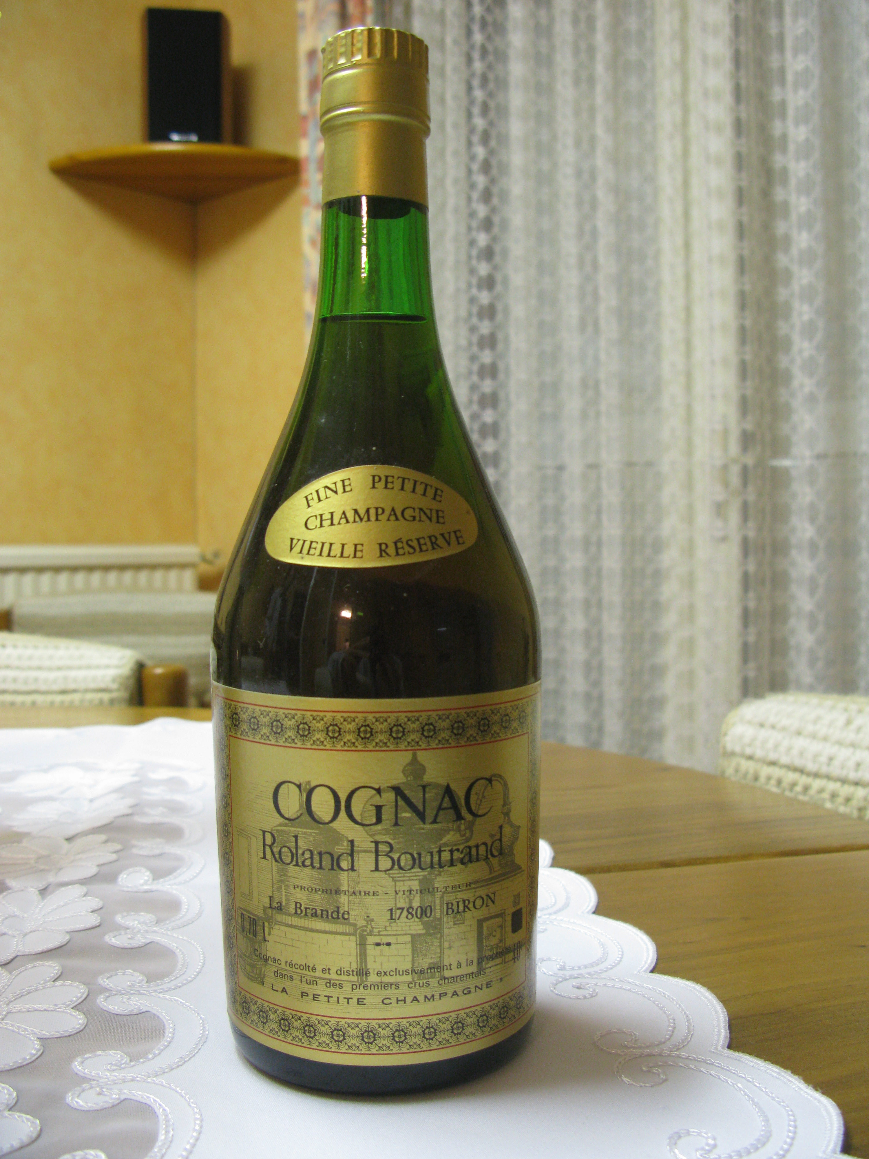 Bouteille de cognac Roland Boutrand de Biron, non datée, mais des années 1970.